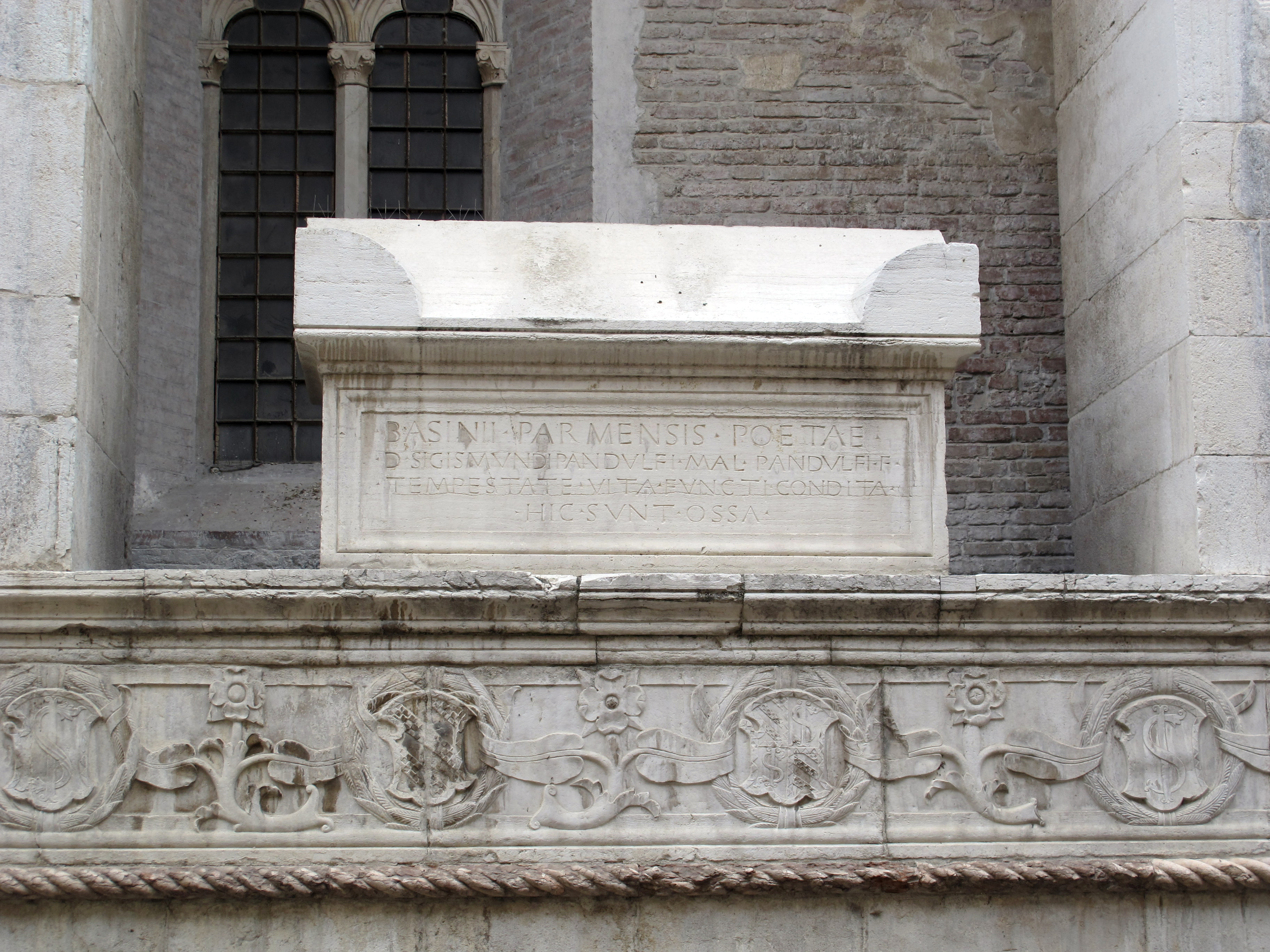 Tempio Malatestiano - MIBAC This is a photo of a monument which is part of cultural heritage of Italy.